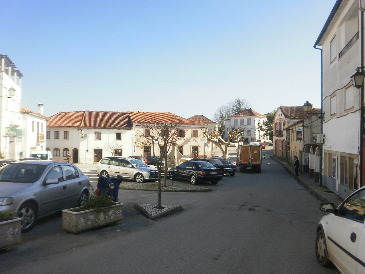 Centro da Vila (Praça Mário da Cunha Brito)